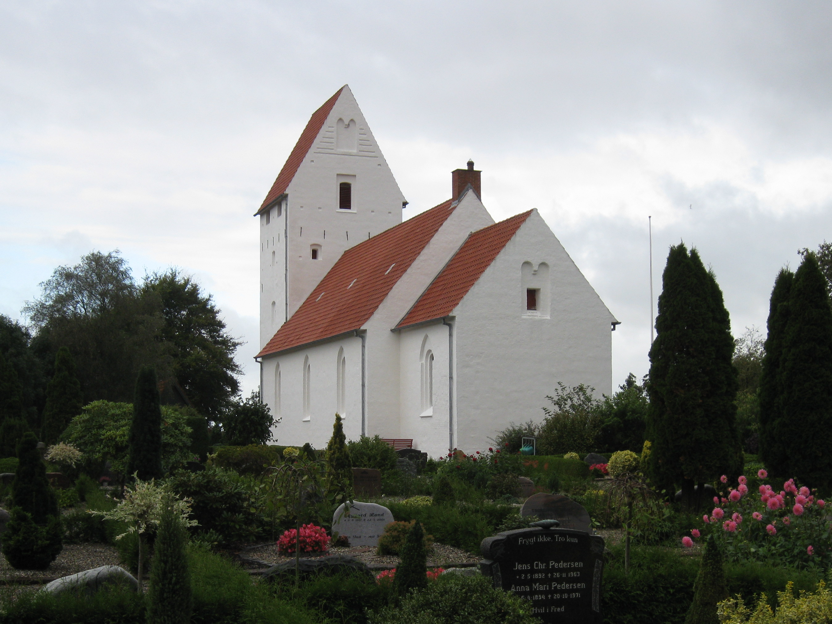 Studsgård Kirke